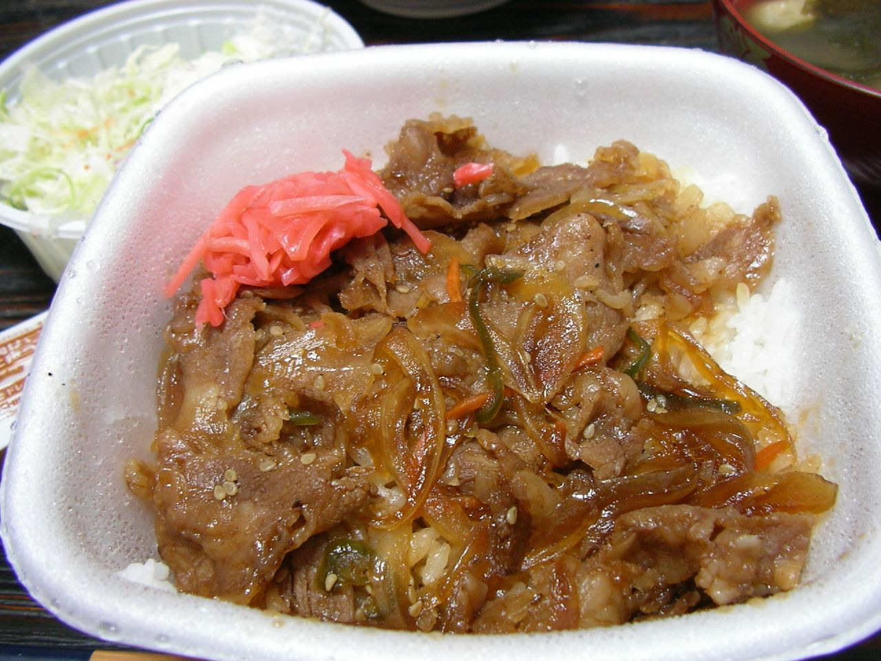 牛焼肉丼を持ち帰ってみた。